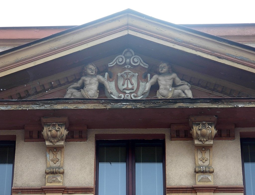 Kamienica ul. Dworcowa 8 w Bydgoszczy